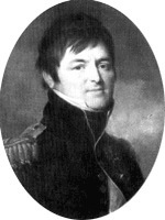 Frederik Willem van Nassau-Weilburg